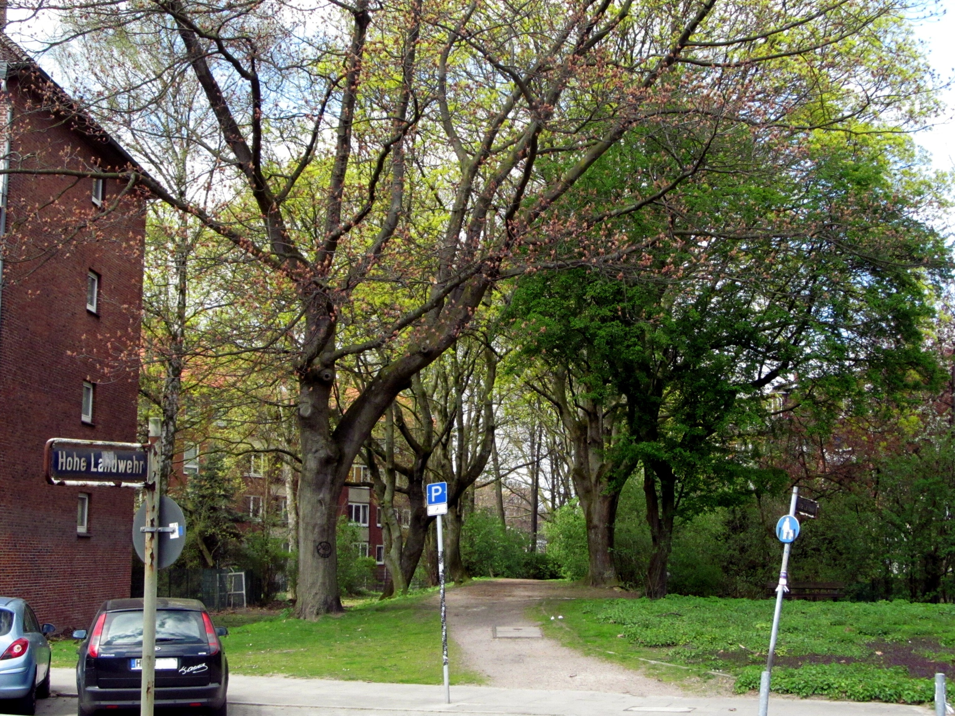 Fußweg Hohe Landwehr in Hamburg-Hamm, letzter Rest der mittelalterlichen "Landwehr" vor der eigentlichen Stadtbefestigung